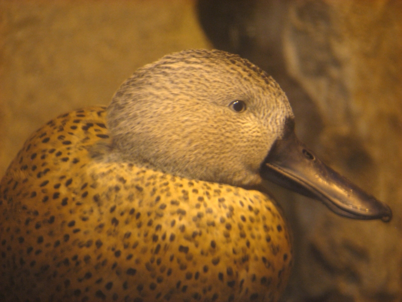 Anas platalea